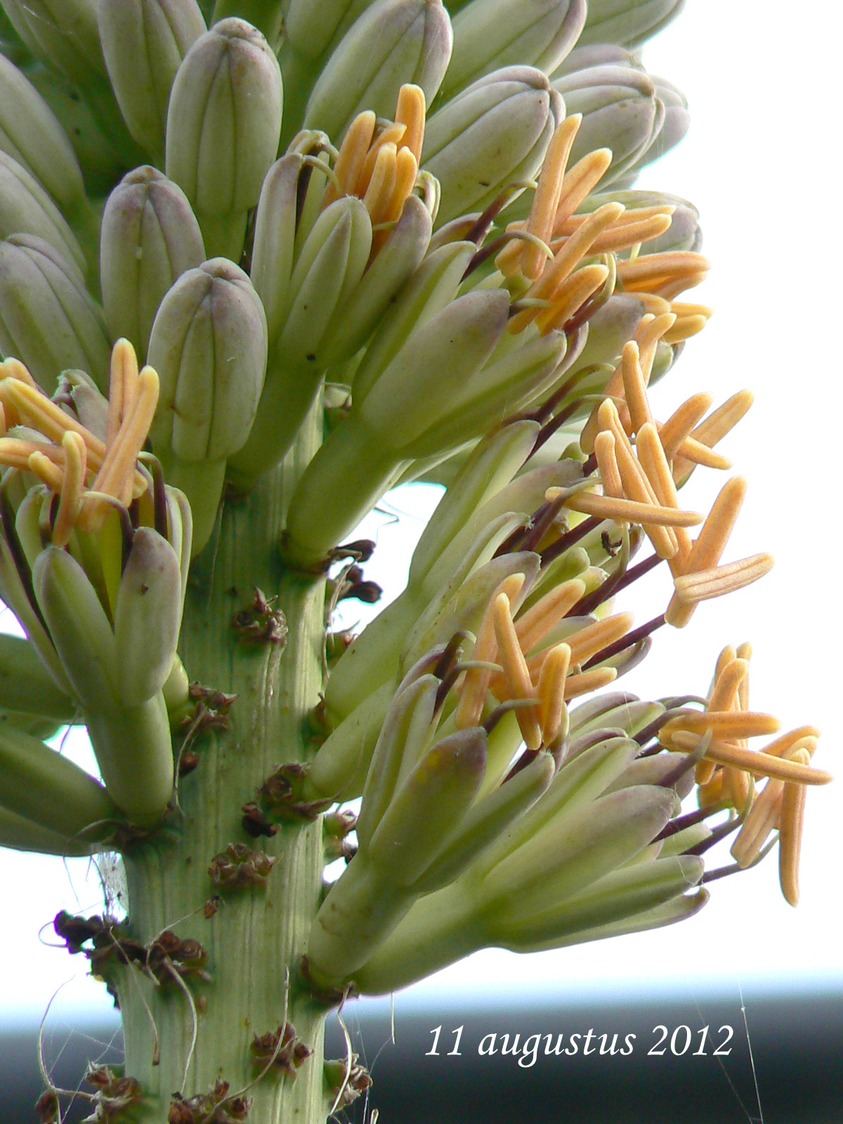 Dit zijn de bloemen van de Agave victoriae regiae, foto's genomen augustus 2012 te Warmond, gem. Teylingen, Nederland.